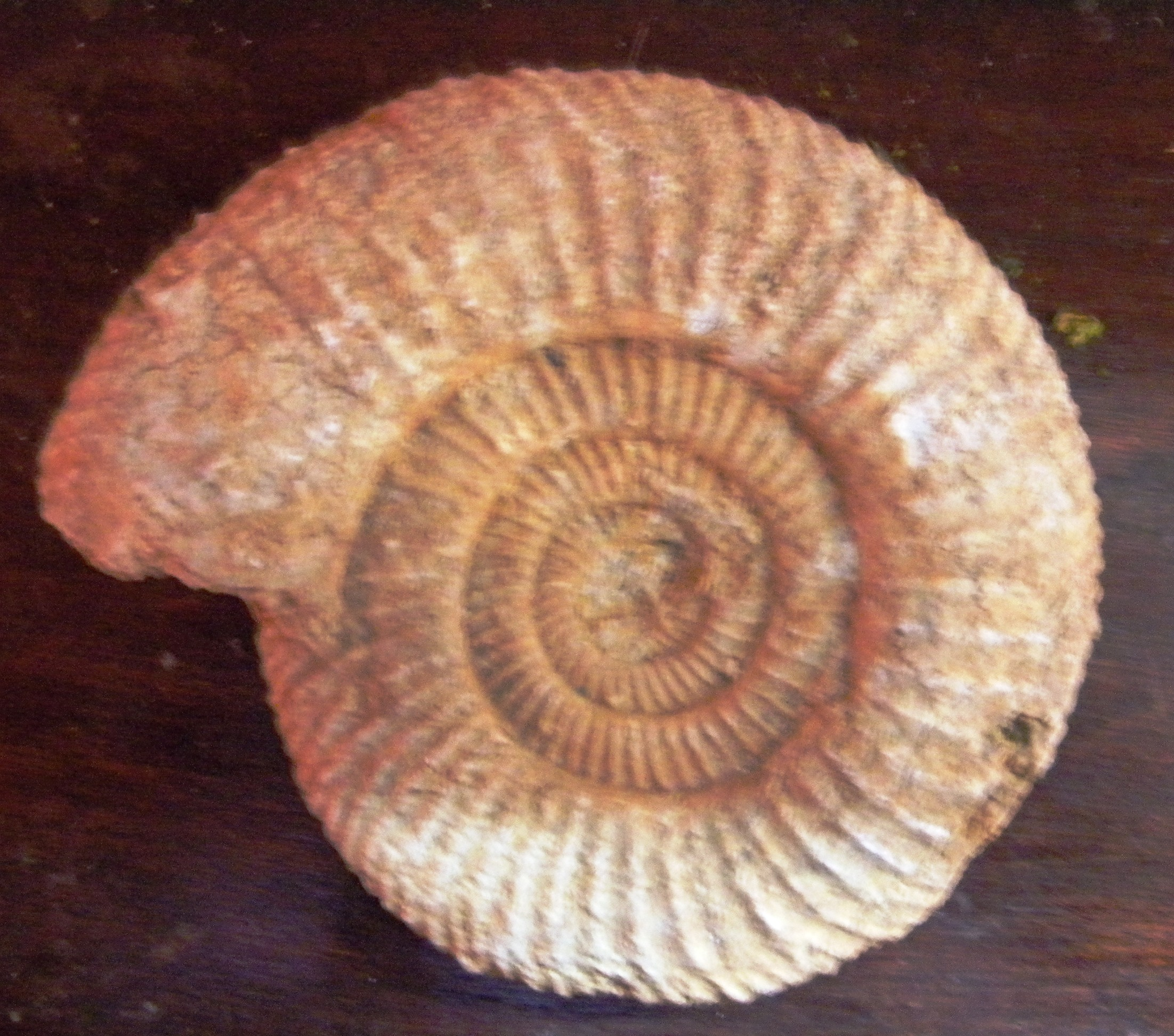 Parkinsonia parkinsoni, Limey-Remenauvilee, (Francio)